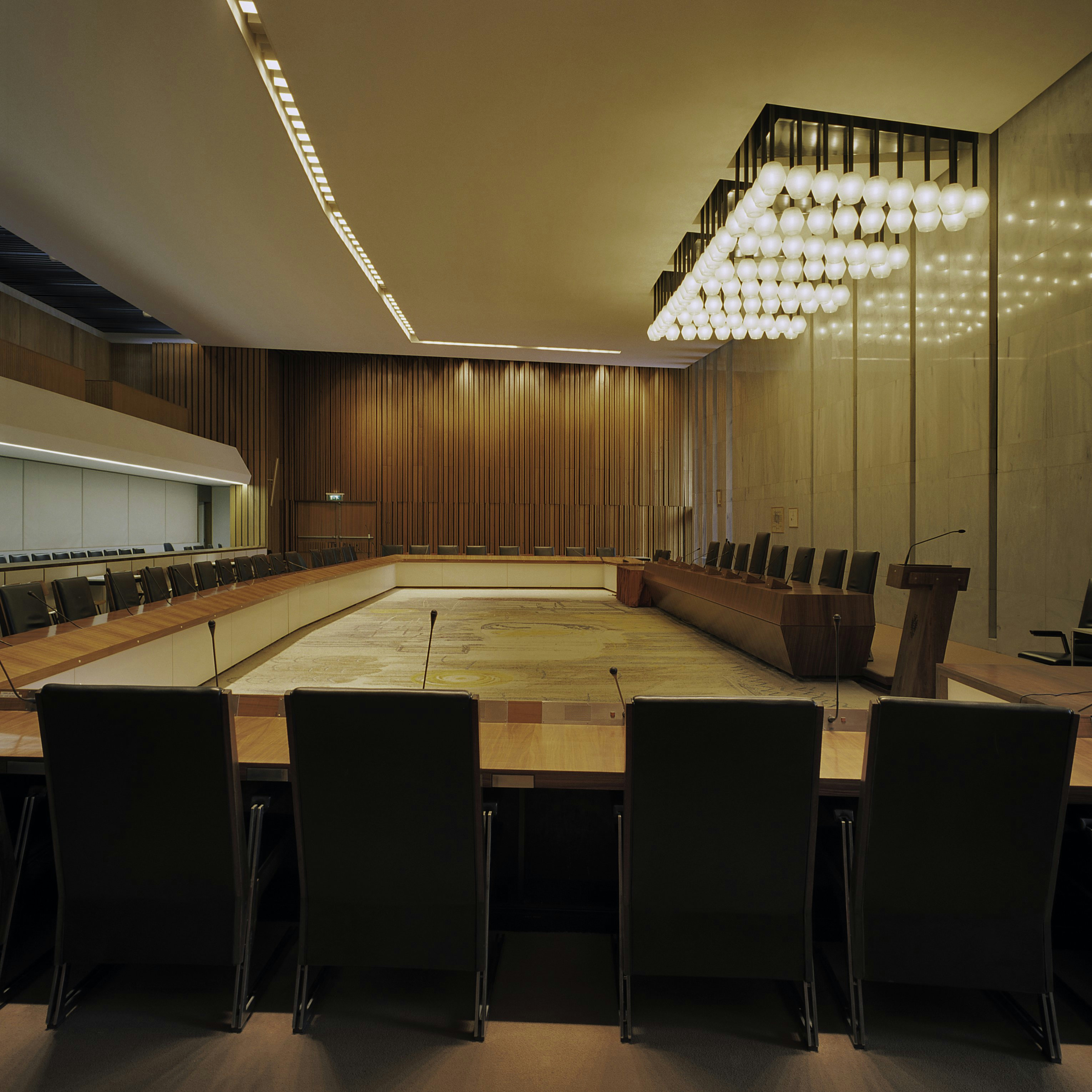 Raadhuis: Interieur, overzicht raadzaal